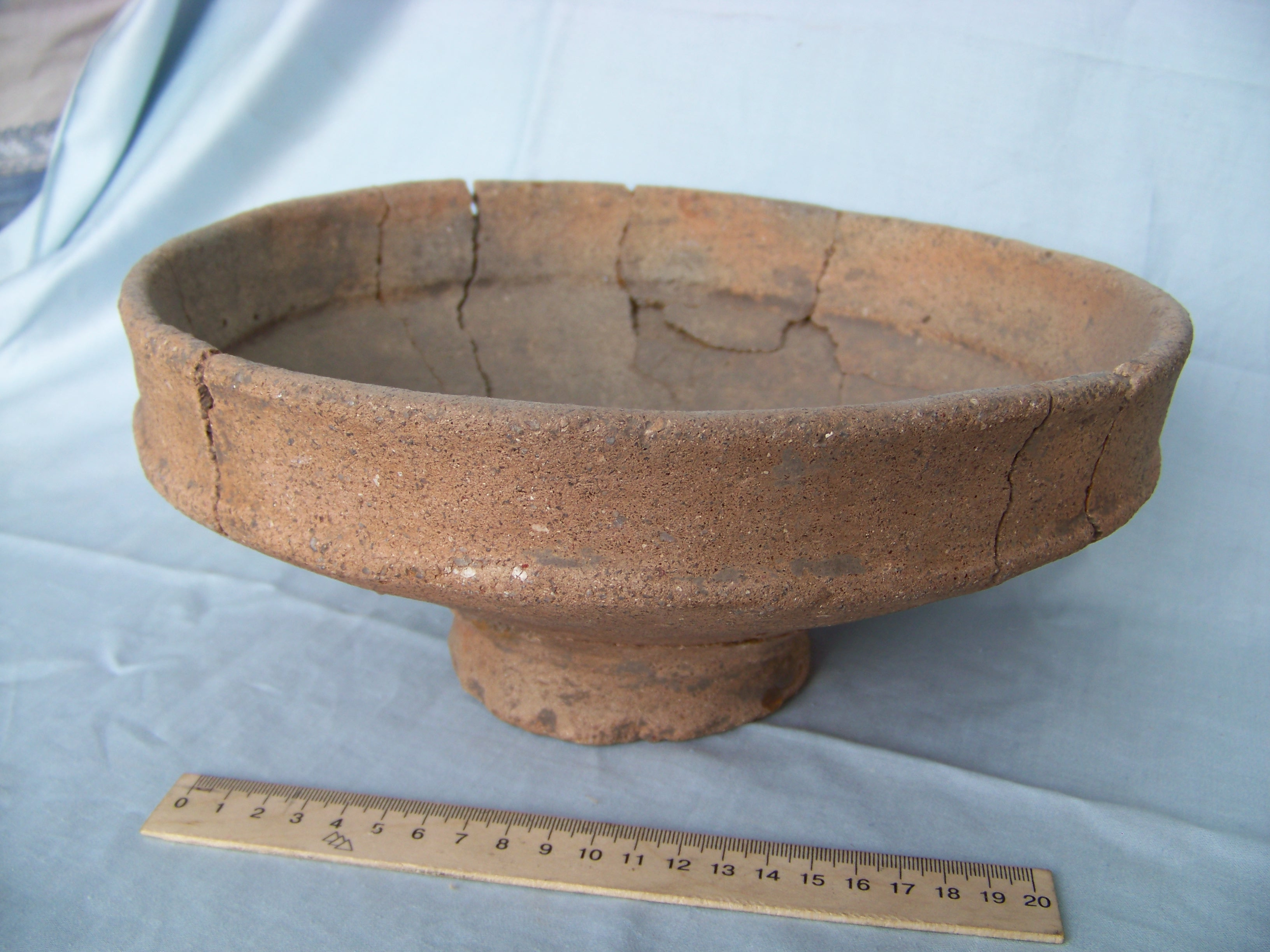 Керамика зарубинецкой культуры. Украина. Археология.